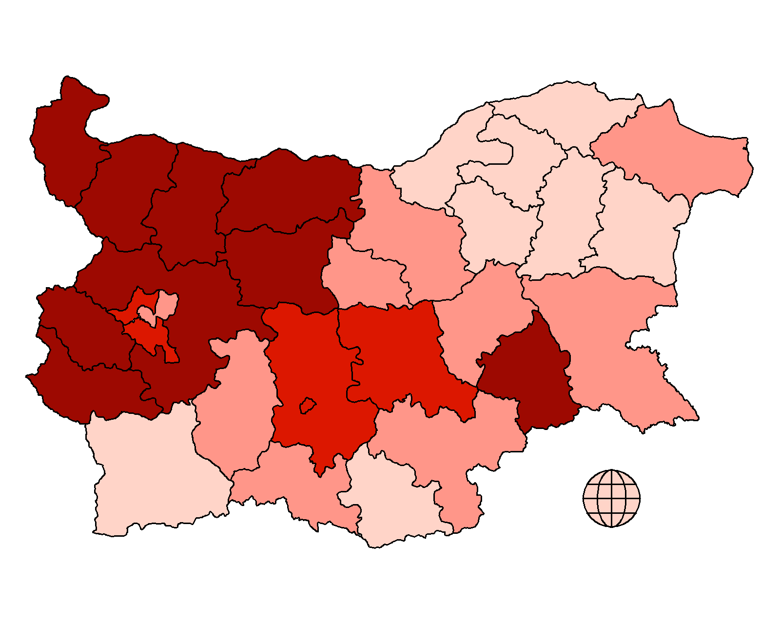 Гласуване по райони за Платформа Европейски социалисти на изборите за Европейски парламент през 2007. Всеки от цветовете съответства на приблизително 1/4 от подадените гласове По тъмният цвят съответства на получен по-голям процент от гласовете